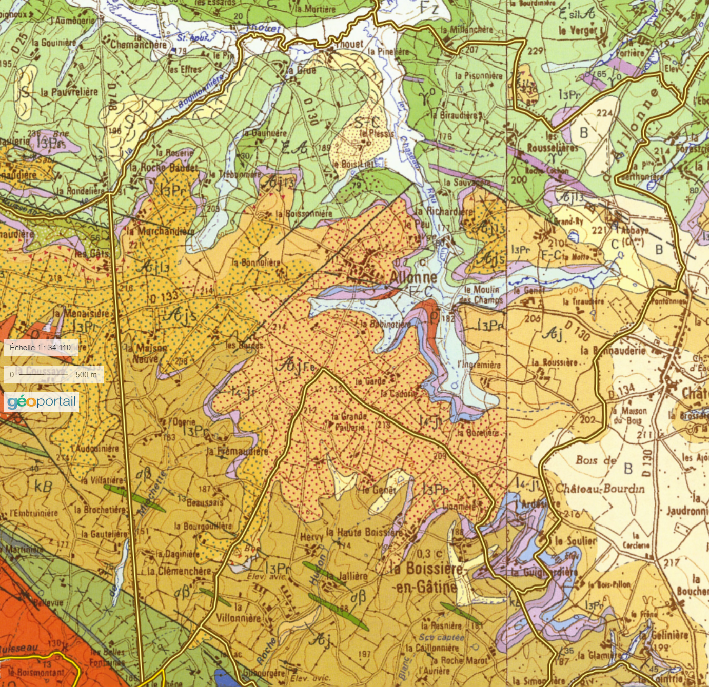 Carte géologique d'Allonne (79), recoupant les feuilles BRGM au 1/50 000 ème de Coulonges-sur-l'Autize et de Mazières-en-Gâtine.